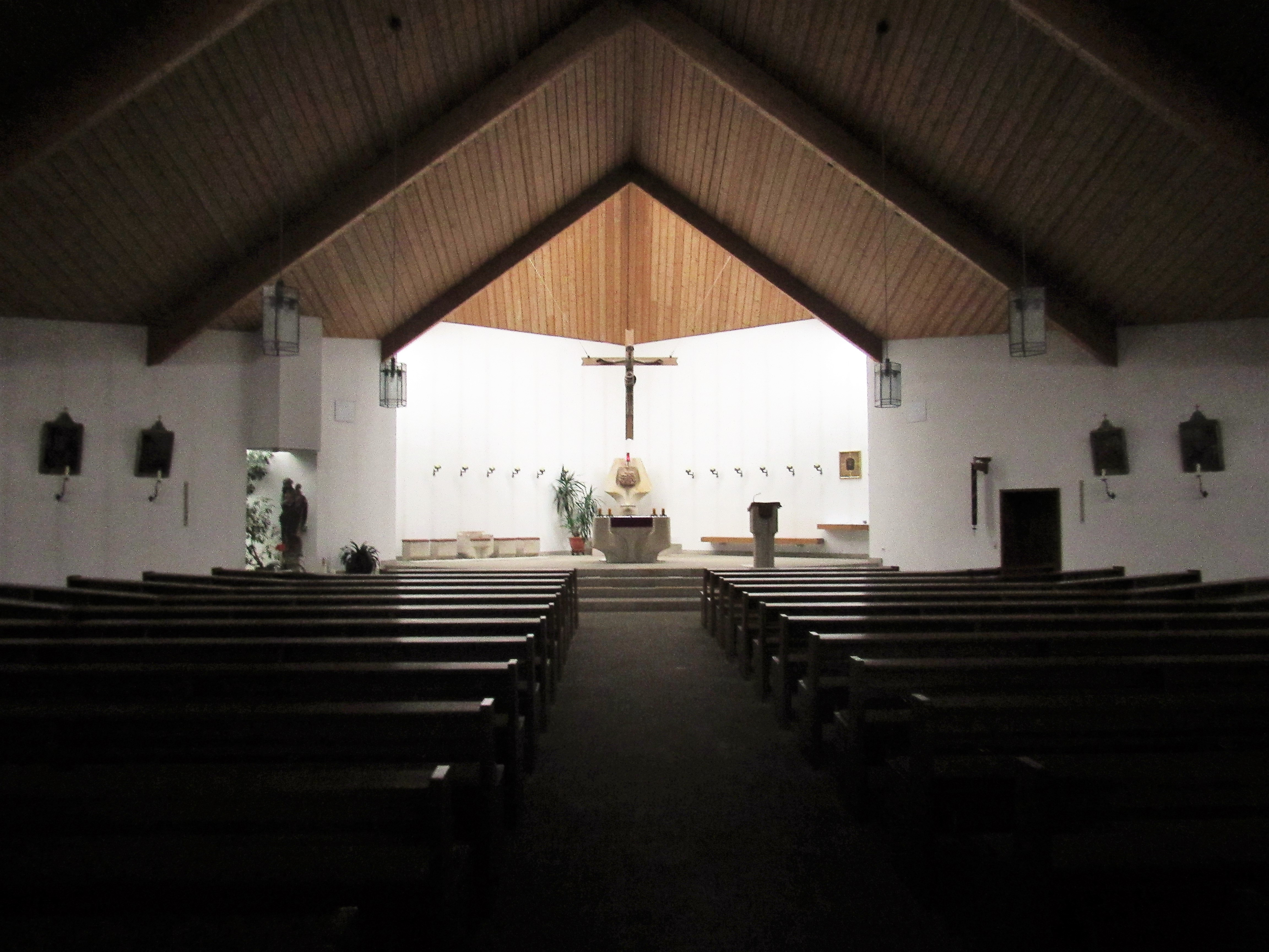 Neubau